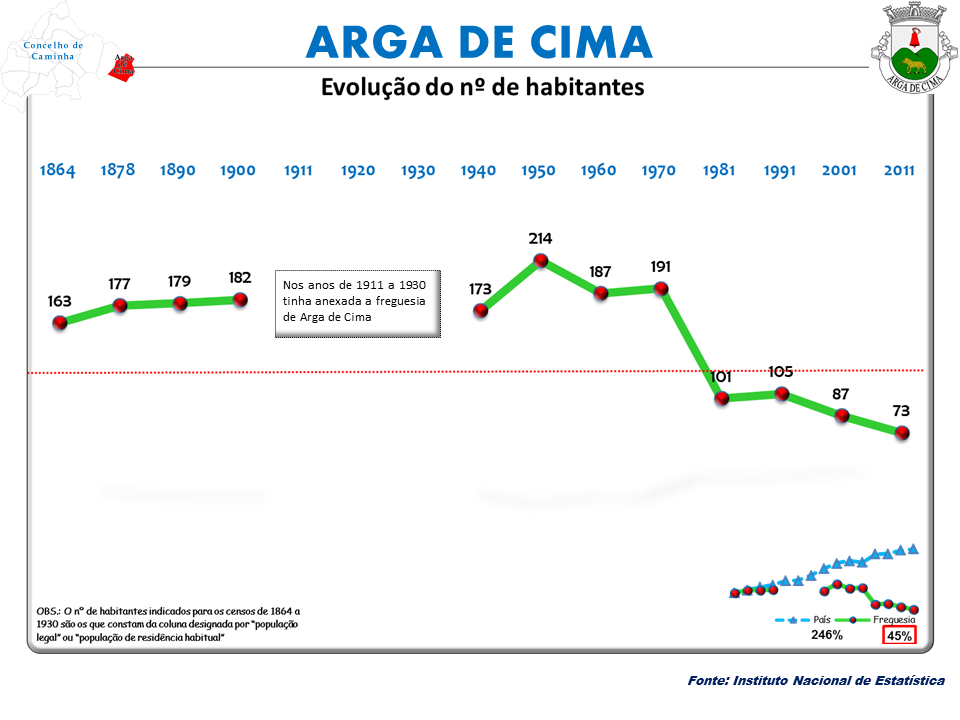 Censos 1864/2011